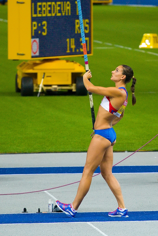 Isinbajewa...3 Fehlversuche bei der WM